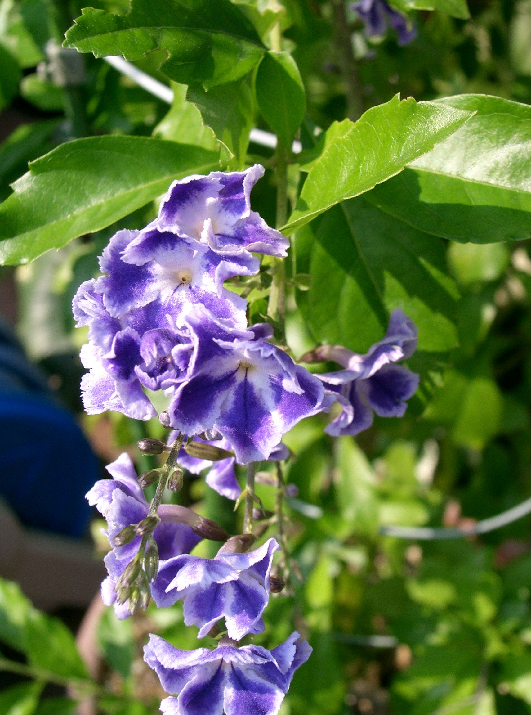 Duranta erecta